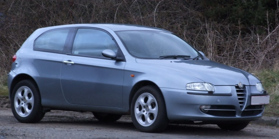 Alfa 147 2.0ltr Lusso Selespeed.